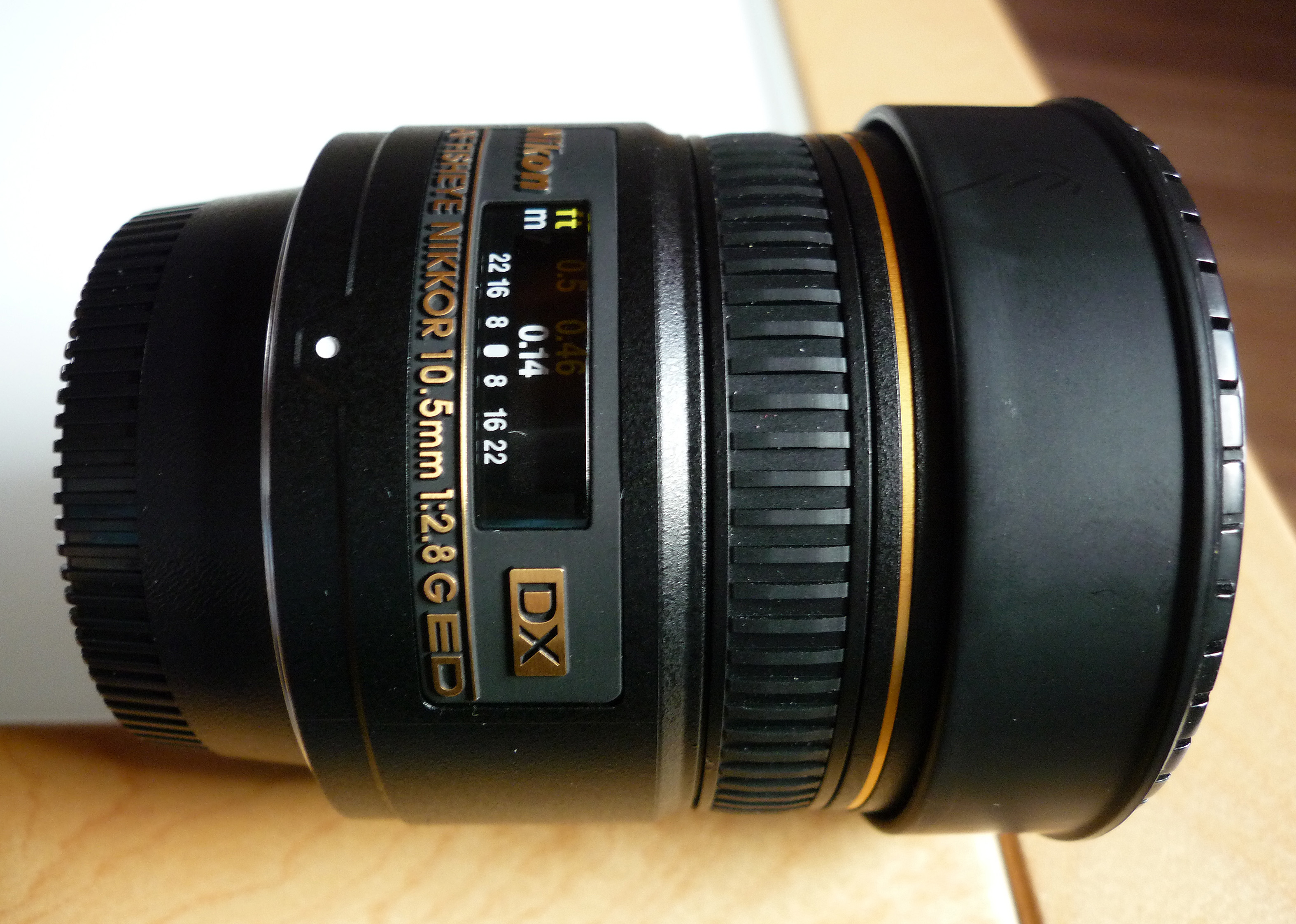 AF DX Fisheye-Nikkor 10,5 mm f/2.8G ED